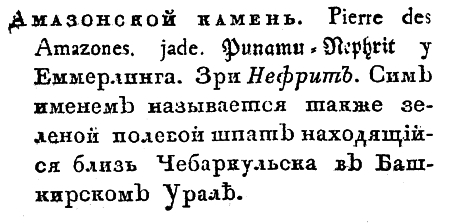 Амазонит в Подробном словаре минералогическом, 1807 года.